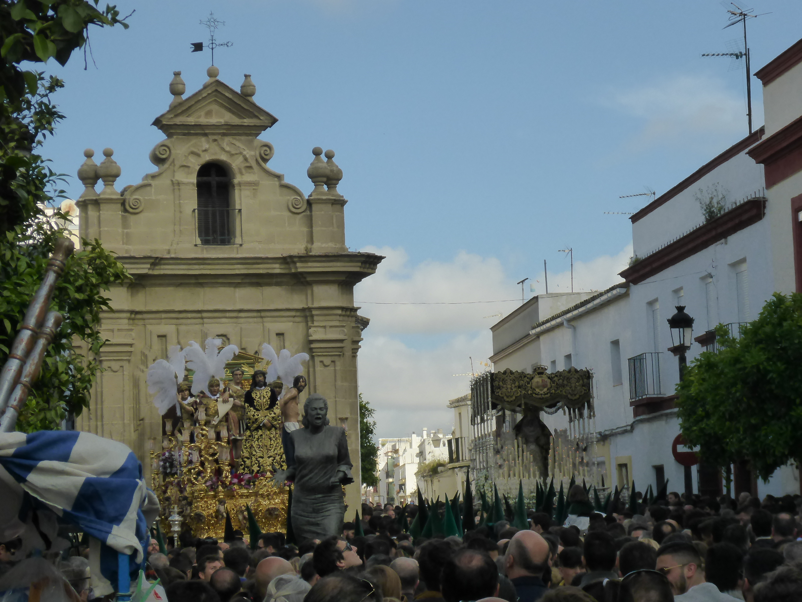 Hermandad de la Yedra (Jerez)